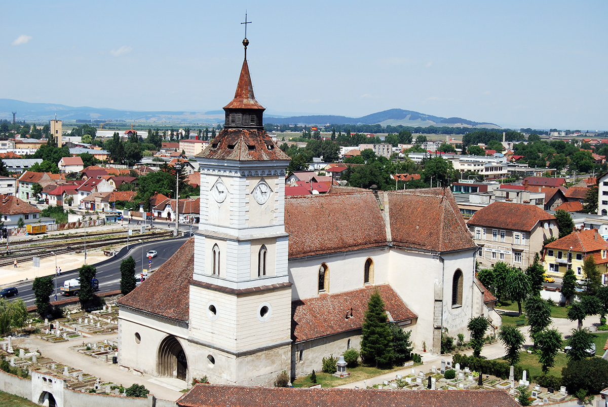 Vederea de la inaltime a bisericii Sf. Bartolomeu din Brasov si a incintei acesteia.